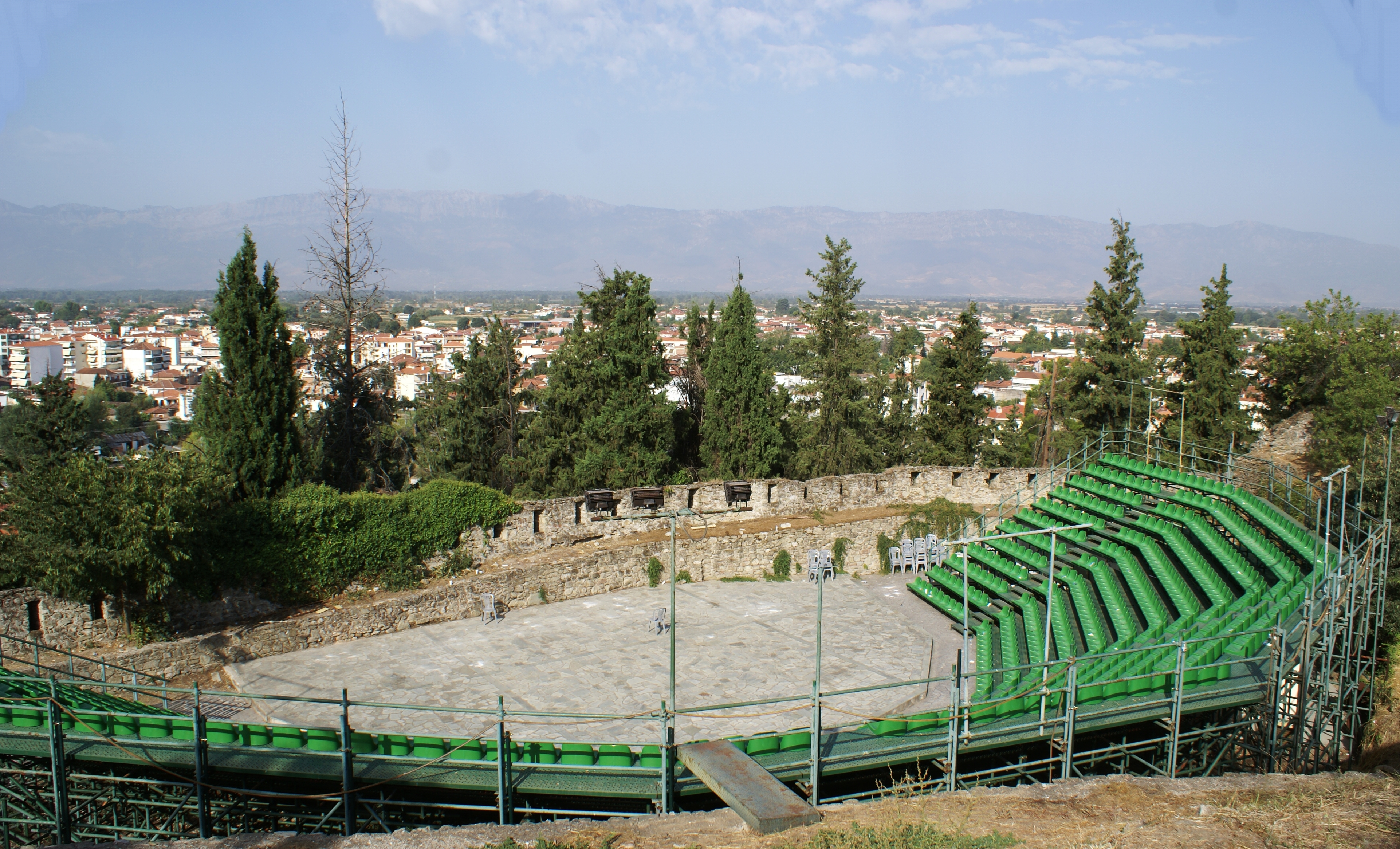 Βυζαντινό Κάστρο Τρικάλων, παλιά πόλη Βαρούσι«Βυζαντινό Κάστρο Τρικάλων, παλιά πόλη Βαρούσι»